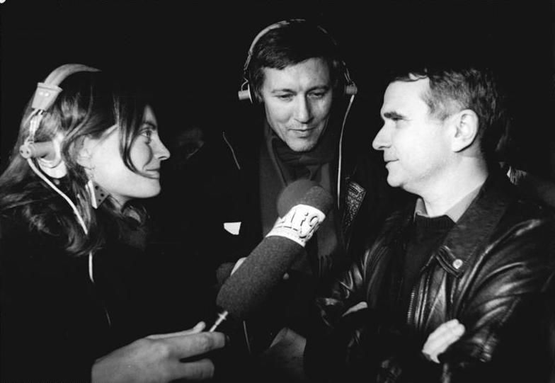 Berlin, Demonstration für FDJ-Erneuerung ADN-ZB Roeske 16.11.89 Berlin: Demonstration "Gemeinsam sind wir stärker" - unter dieser Losung demonstrierten hunderte Jugendliche im Berliner Lustgarten für die Erneuerung der FDJ. Vor Journalisten äußerte sich ihr 1. Sekretär, Eberhard Aurich, zum Motto des Demo-Aufrufs der FDJler von Bergmann-Borsig:"Tschüß! Eberhard". Abgebildete Personen: Aurich, Eberhard: 1. Sekretär des Zentralrates der FDJ, DDR